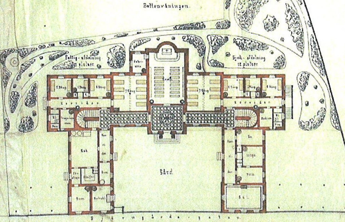 Byggnad för Konung Oscar I:s Minne, planritning, bottenvåning